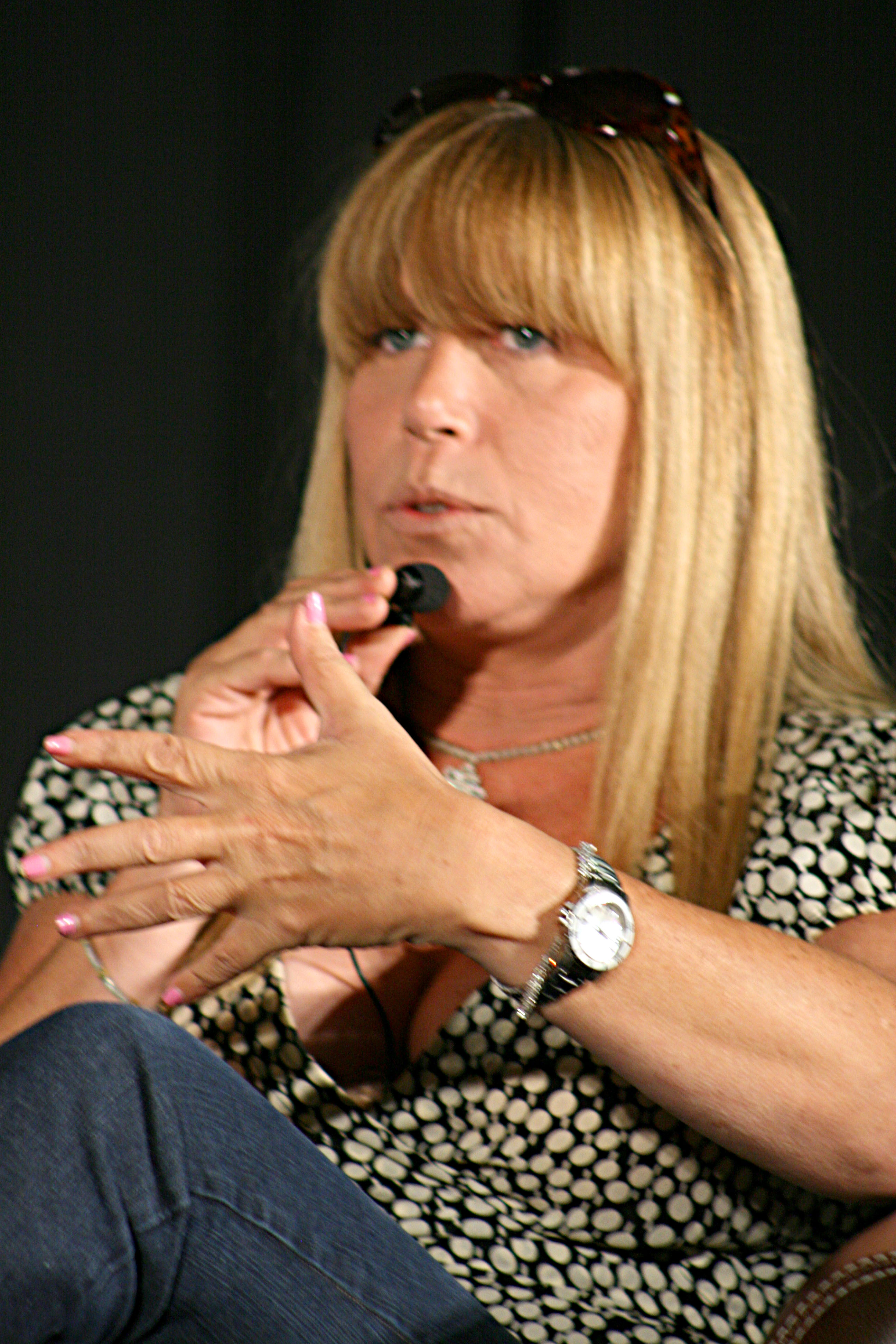 Randi Rhodes